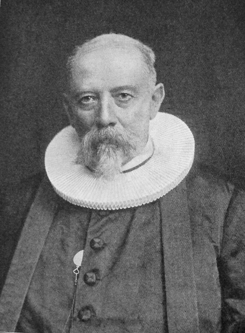 Johan Vilhelm Beck (30. december 1829 - 30. september 1901), dansk præst og formand for Kirkelig Forening for den Indre Mission i Danmark.